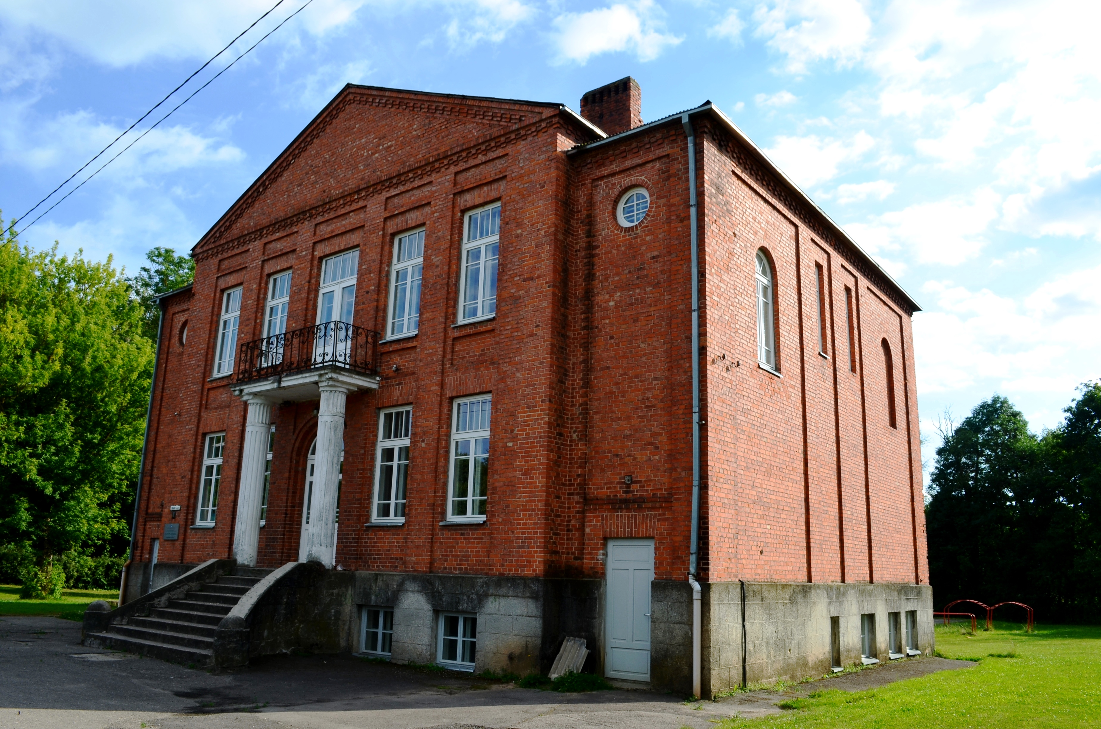 Akademijos pradinė mokykla, Kėdainių raj.